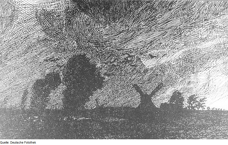 Original image description from the Deutsche Fotothek Windmühle im Sturm, Zeichnung von Rudolf Sievers/Braunschweig, aus: Heimatkalender Bad Liebenwerda, 1915